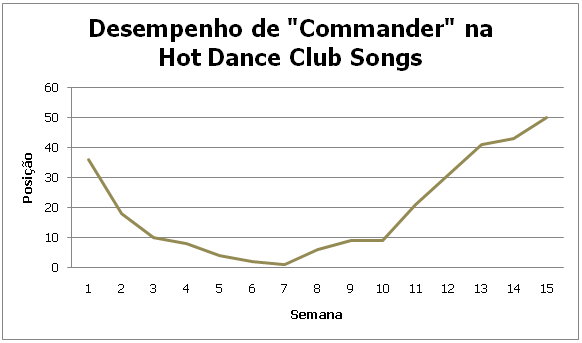 Trajecto da canção "Commander" na Hot Dance Club Songs.